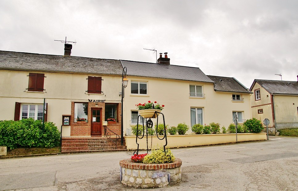 La Mairie